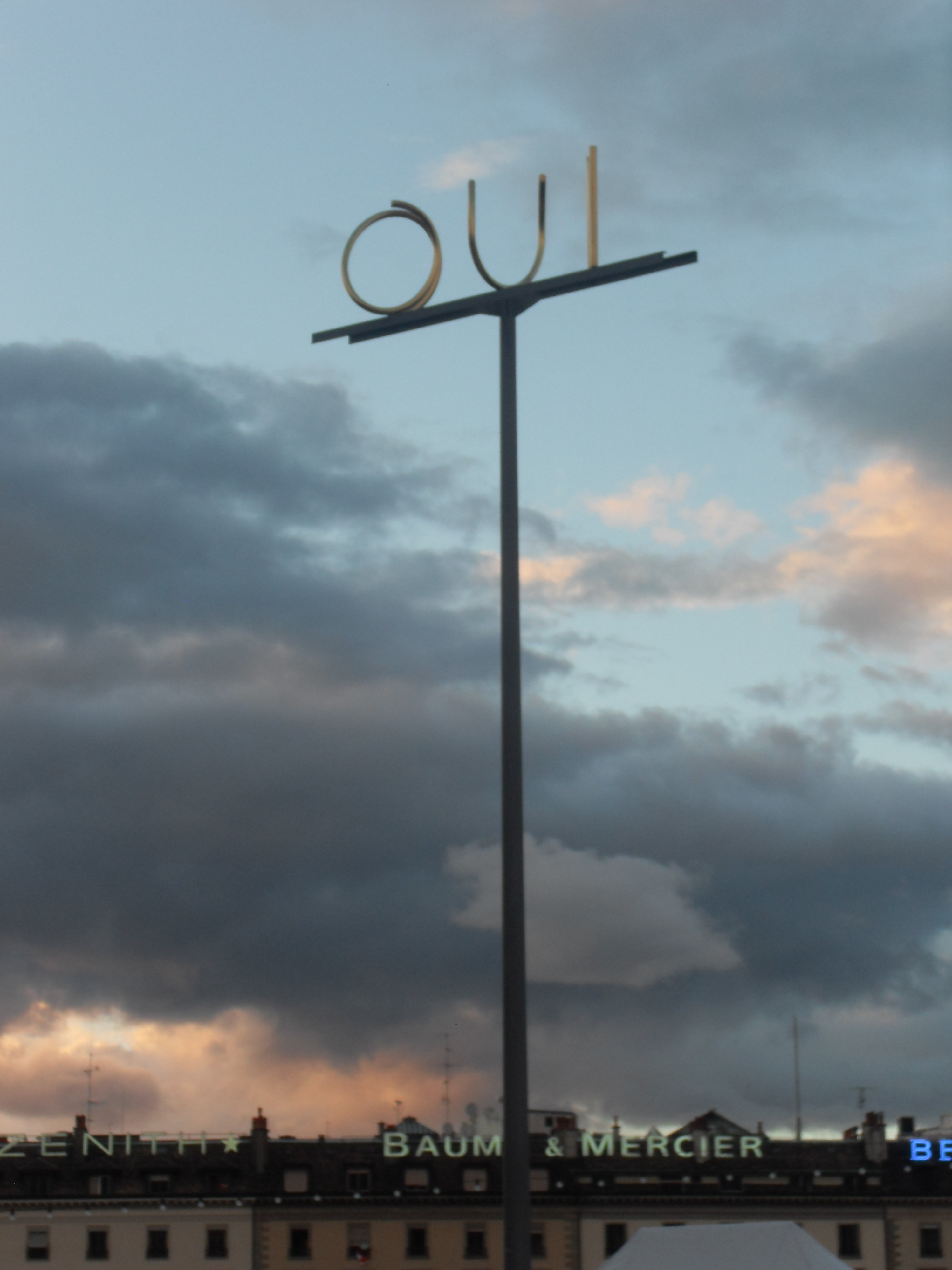 Werk von Markus Raetz. « Sans titre » (OUI-NON), 2000, Place du Rhône, Genf.